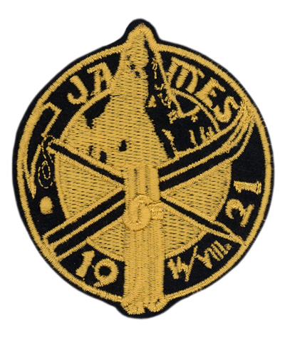 Odznak Slovenského horolezeckého spolku JAMES . SHS JAMES je športové (horolezecké) občianske združenie so sídlom v Bratislave, ktoré vzniklo 13. marca 1990